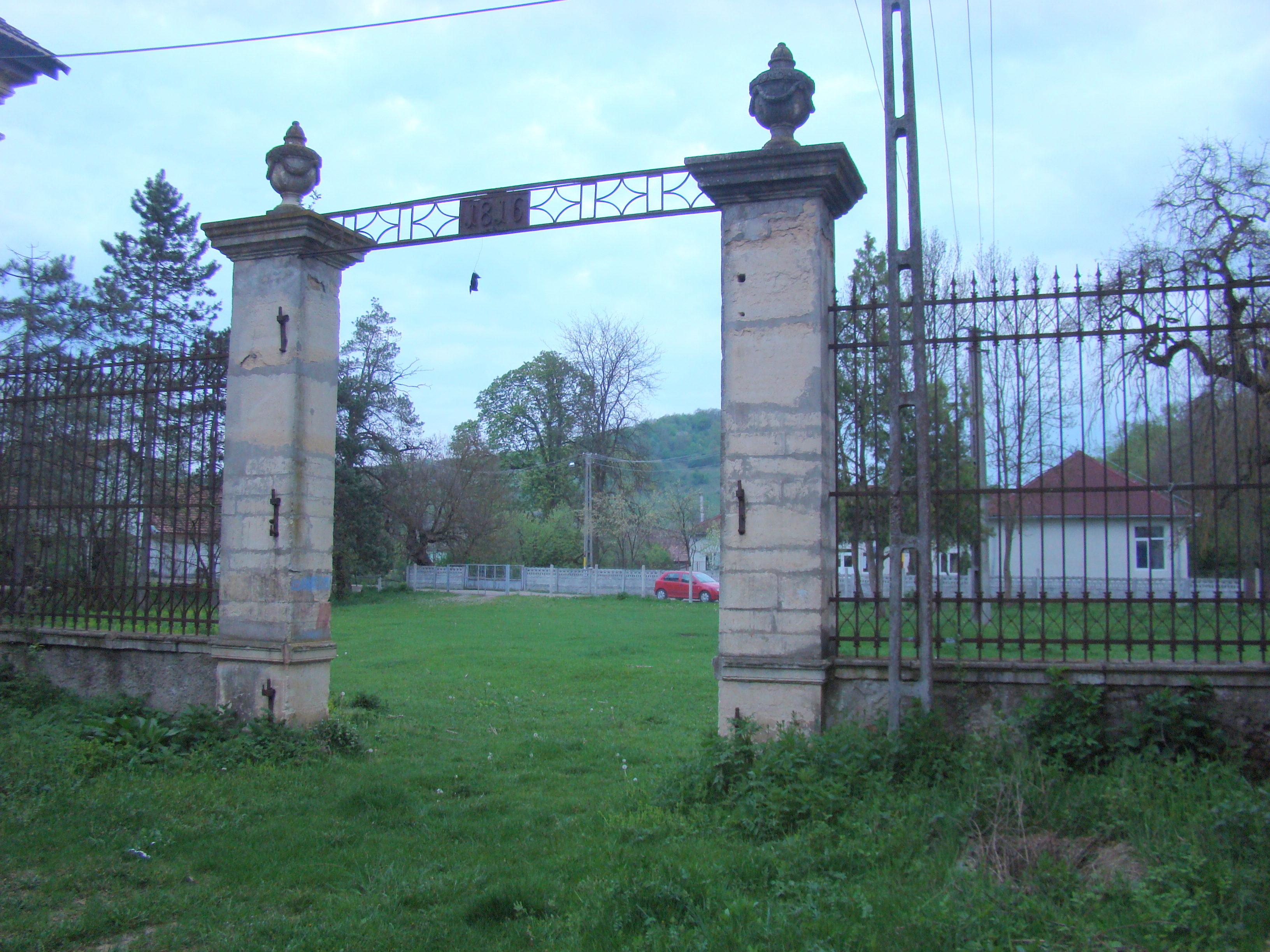 Castelul Bethlen, sat Dragu; comuna Dragu, judeţul Sălaj 01